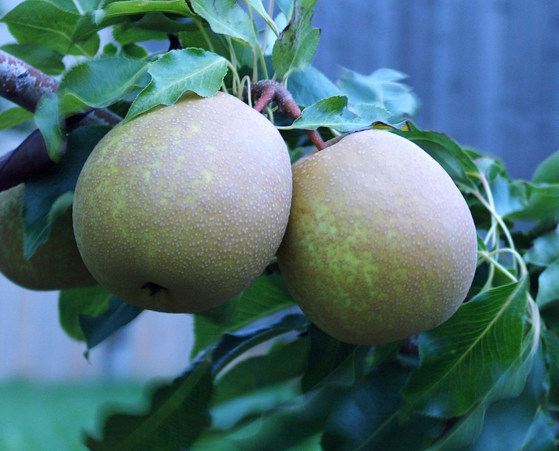 Benita-Birne, Kreuzung aus Nashi- und europäischer Birne